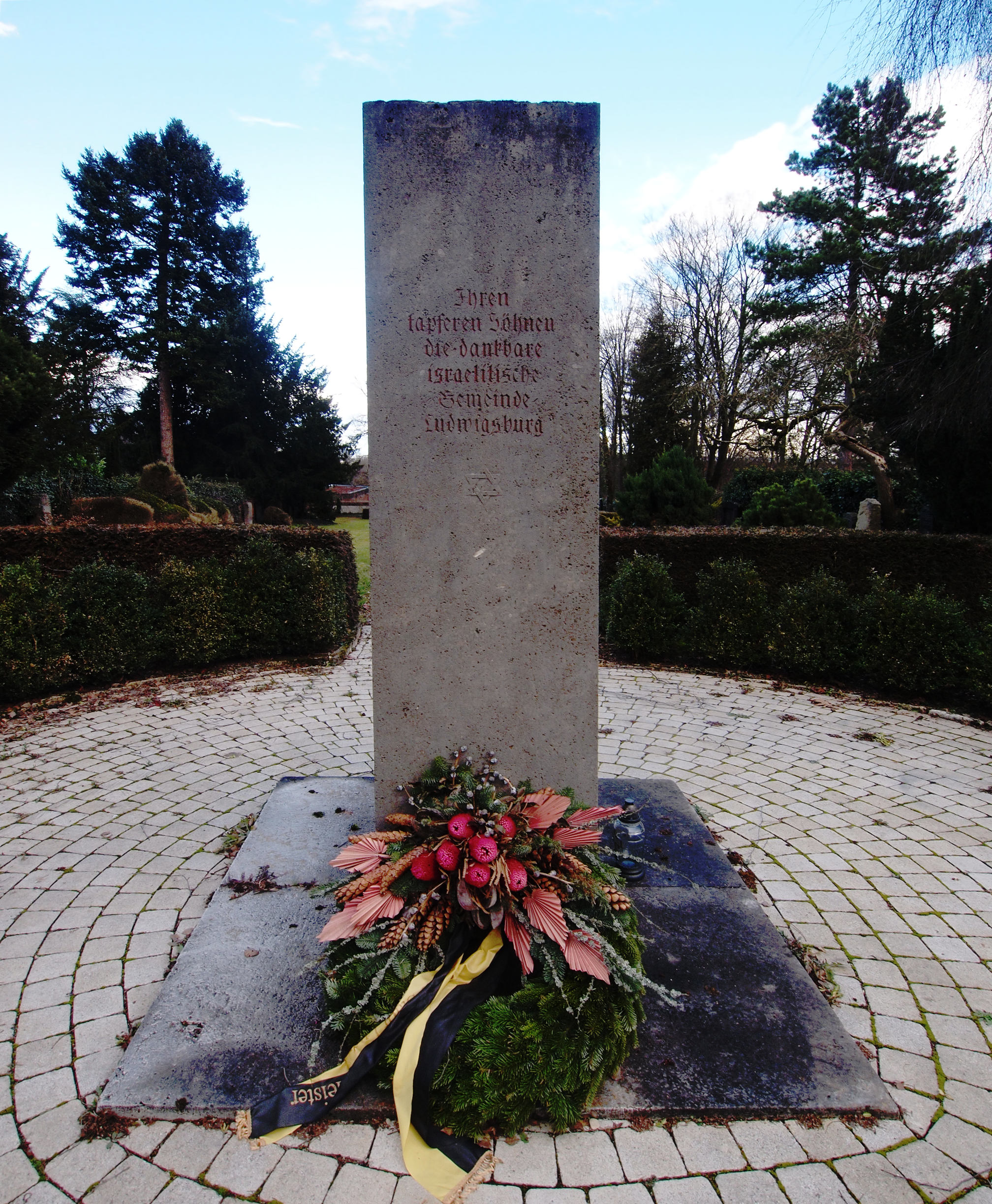 Denkmal auf dem neuen jüdischen Friedhof in Ludwigsburg